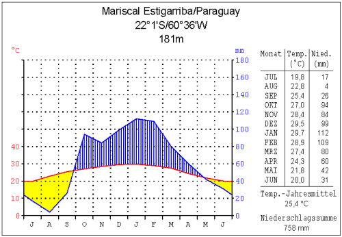 Klimadiagramm Mariscal Estigarriba